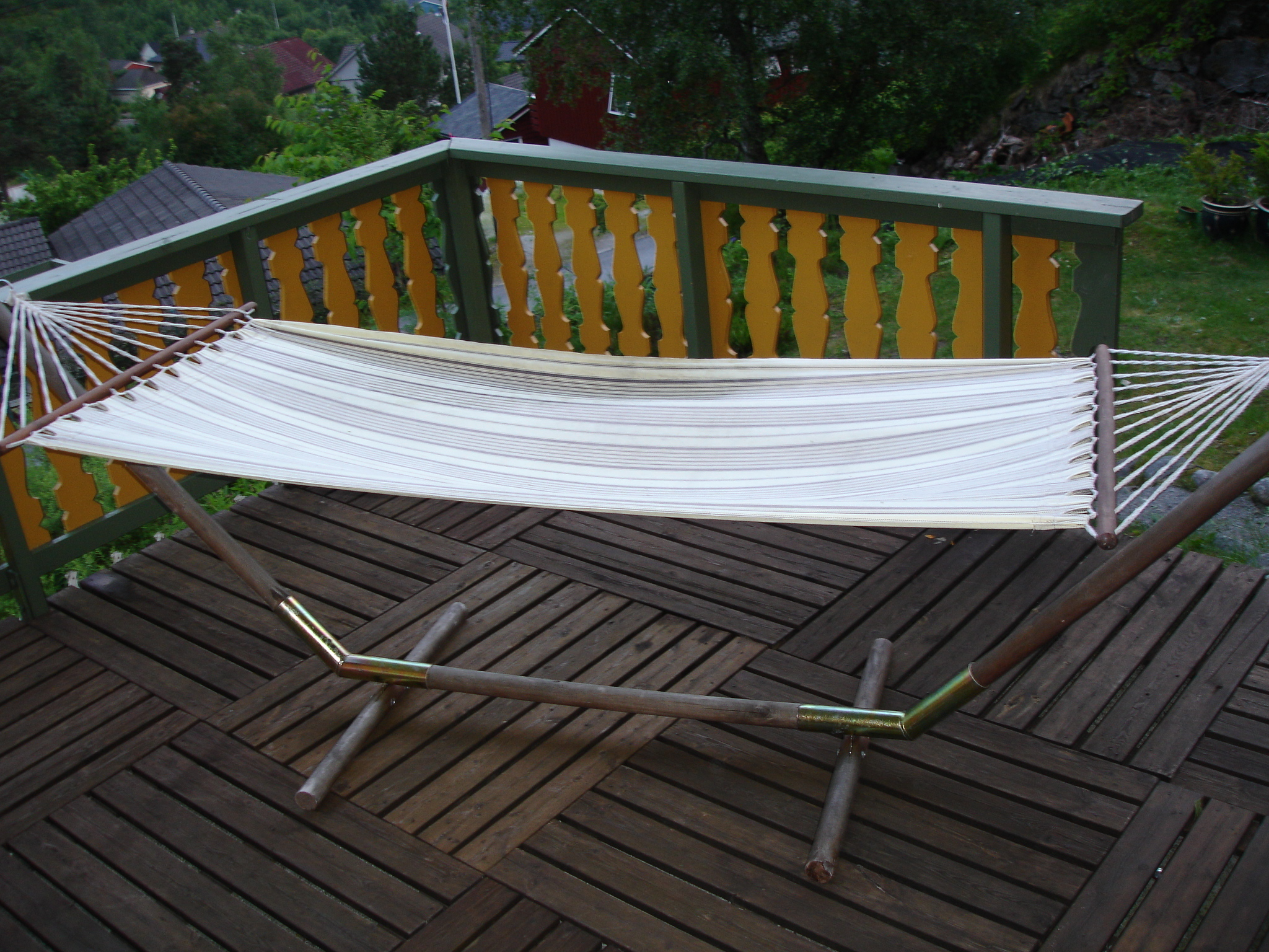 Hengekøye